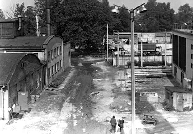 Rozbudowa zakładu. 1970 rok.